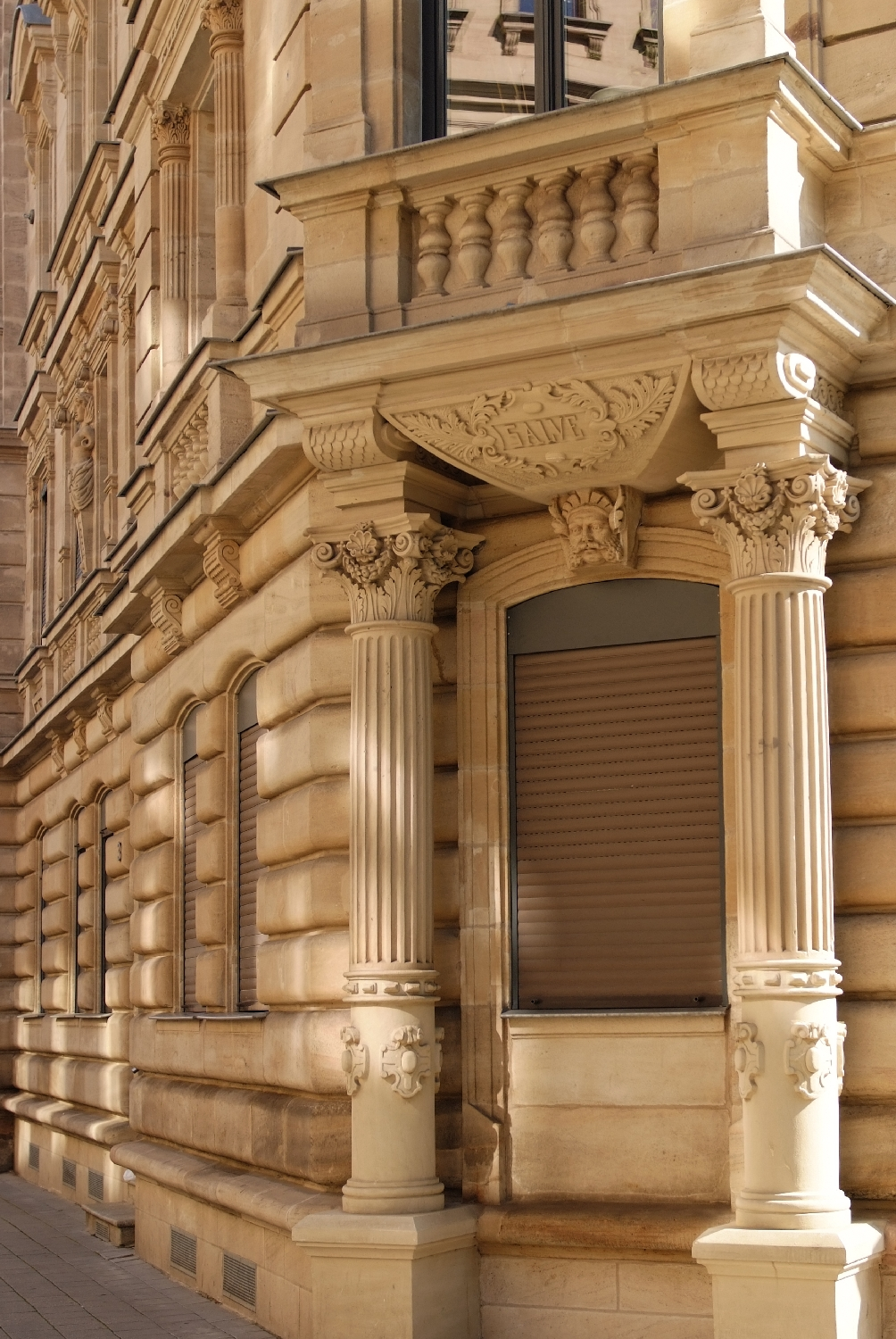 Fürth, Bavaria, Germany